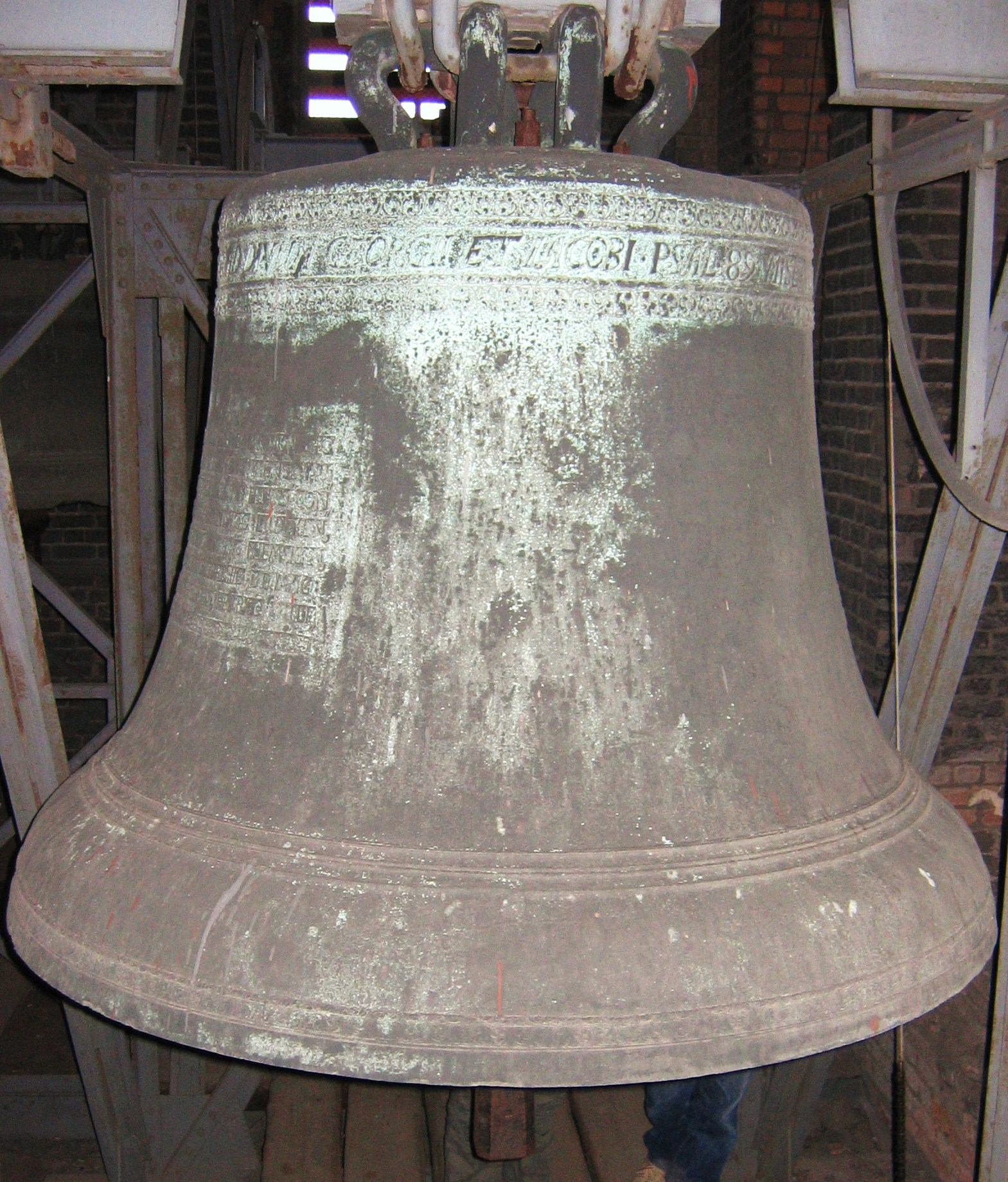 Glocke Großer David der Hannoveraner Marktkirche